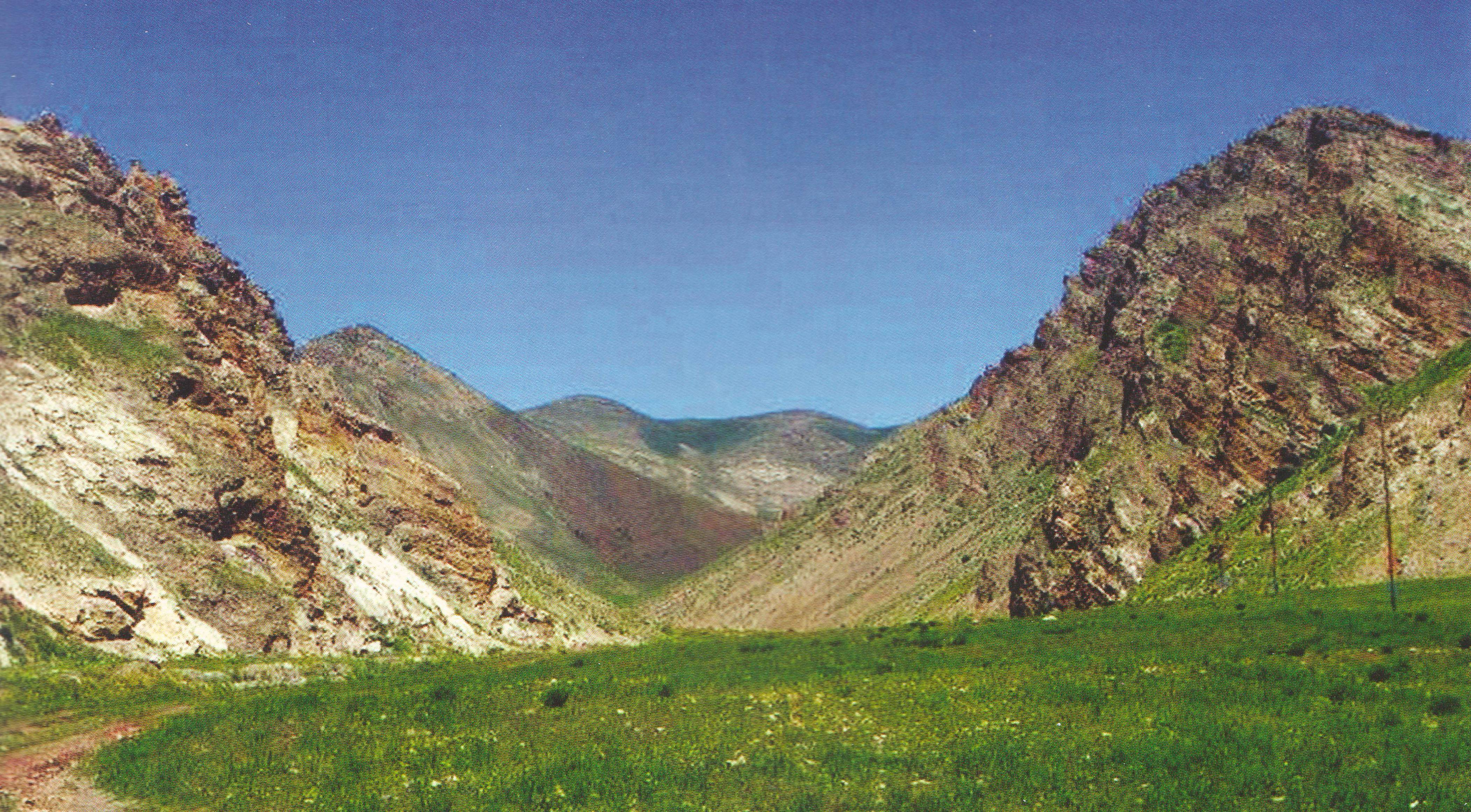 Kəngərli rayonu Çalxanqala